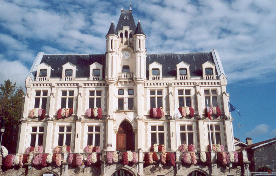 Mairie de Saint-Galmier.